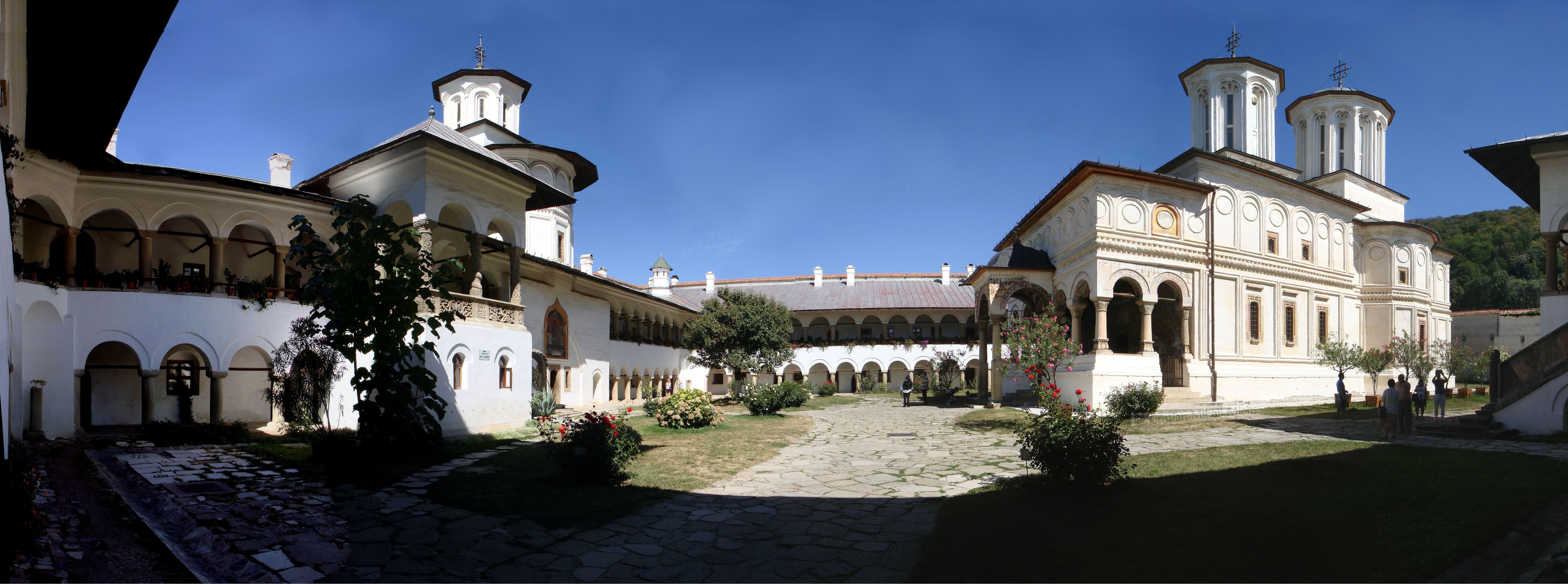 Panorama curţii mănăstirii Hurezi